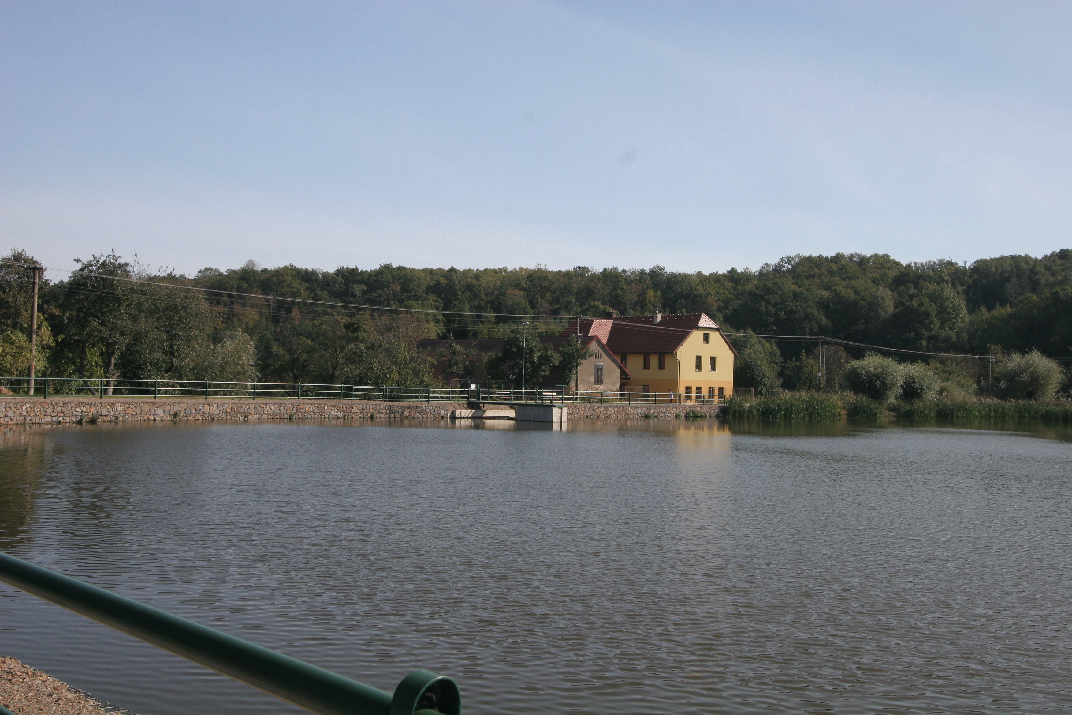 Brloh Mlýnský rybník